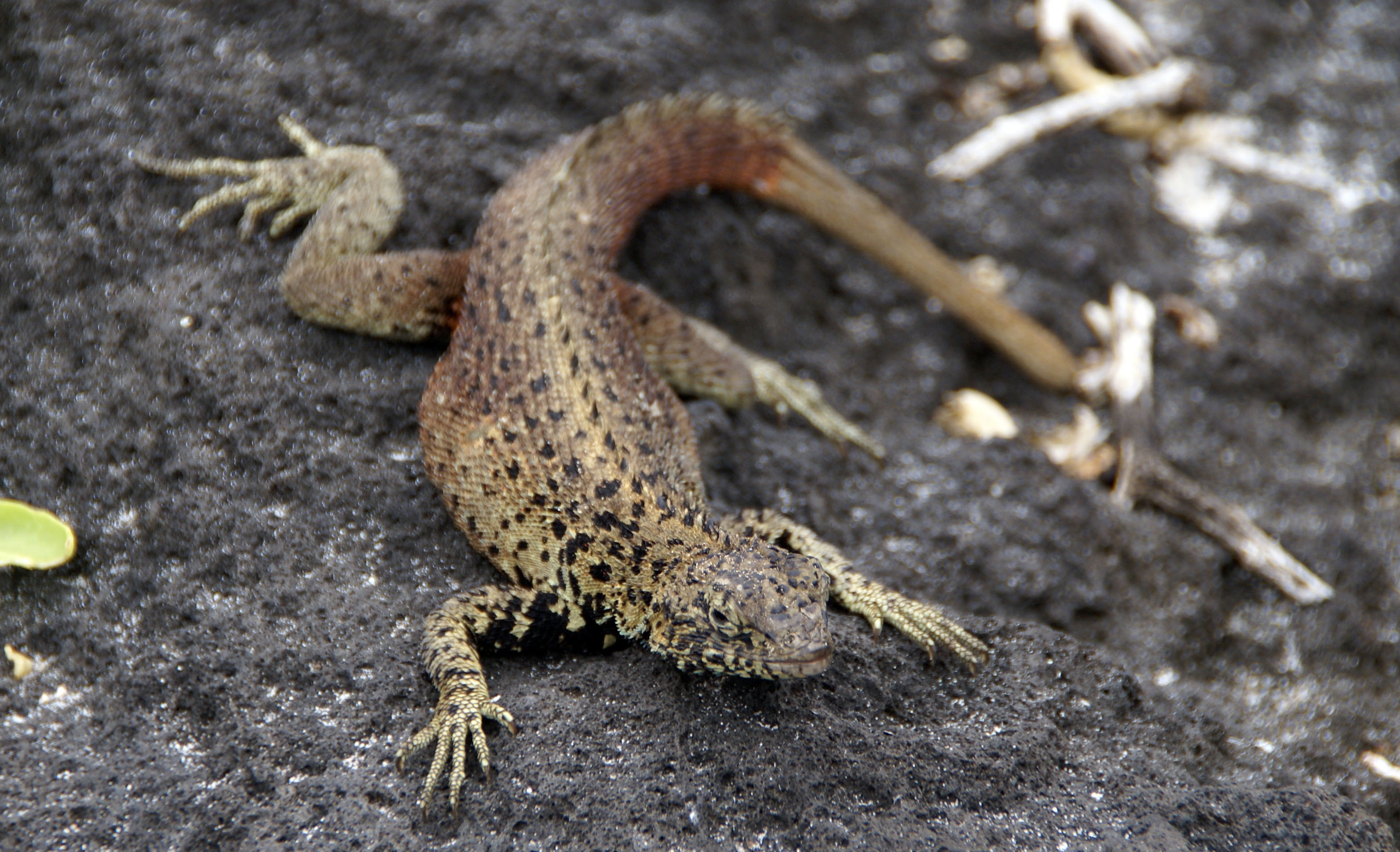 Espanola lava lizard (Microlophus delanonis) (male)